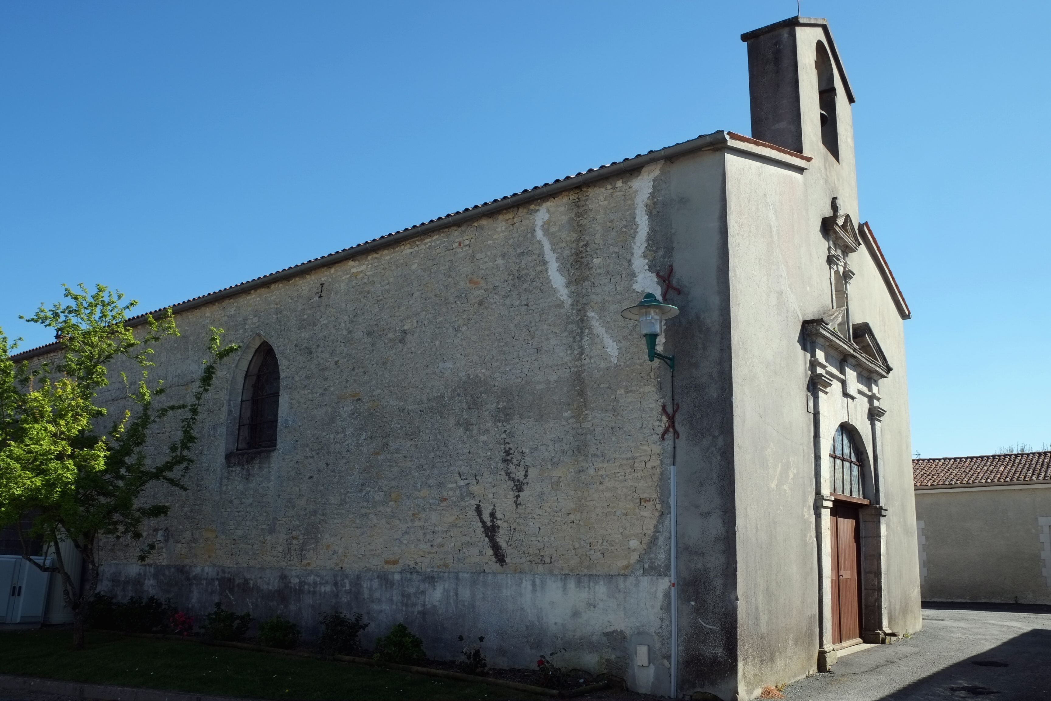 Église de Saint-Christophe Charente-Maritime France